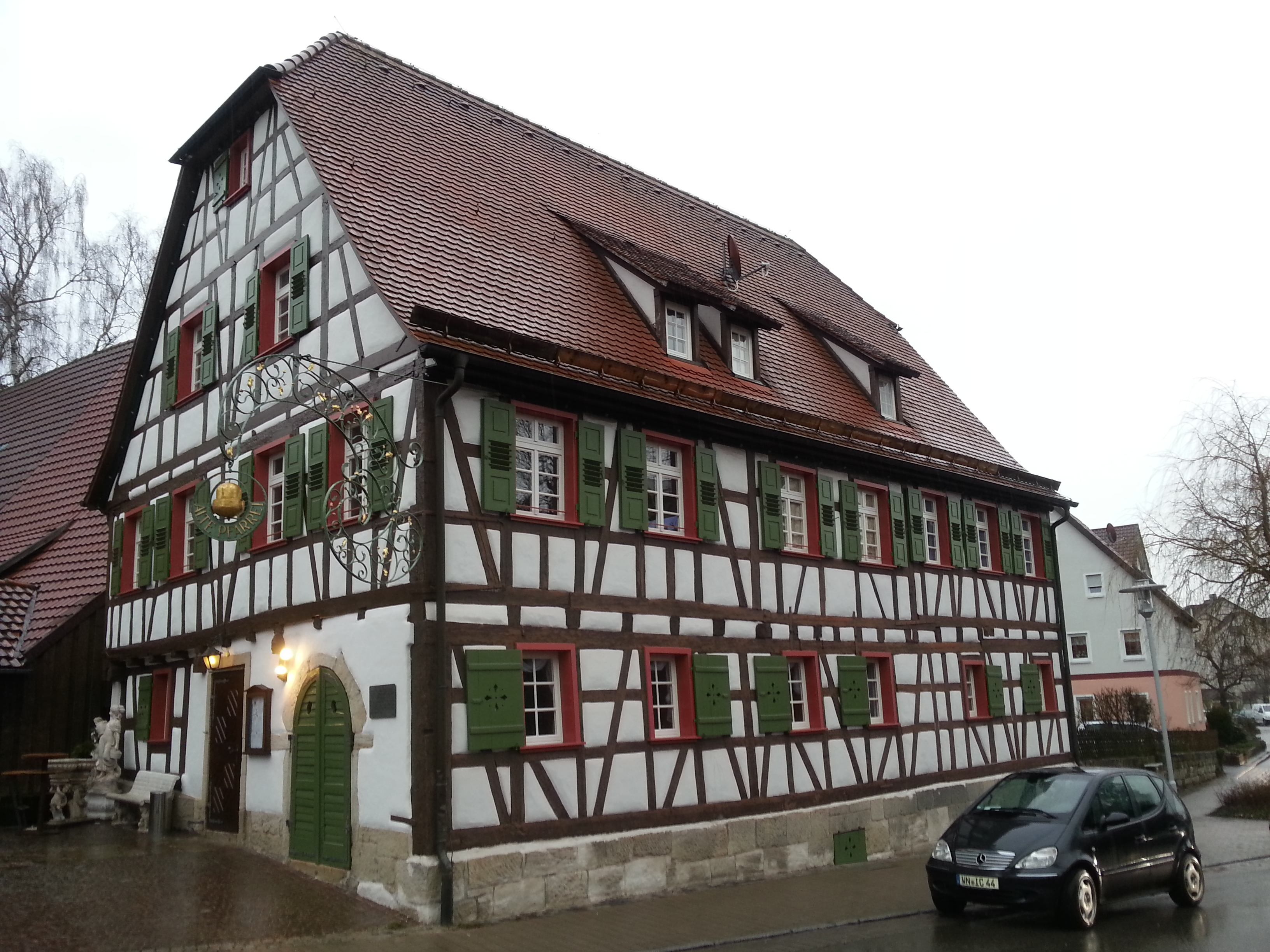 According to the descriptive plate: "Evangelisches Pfarrhaus bis 1966. Geburtshaus von Adolf Widmann (1818-1878), Verfasser von Erzählungen, Schauspielen und politischen Abhandlungen.